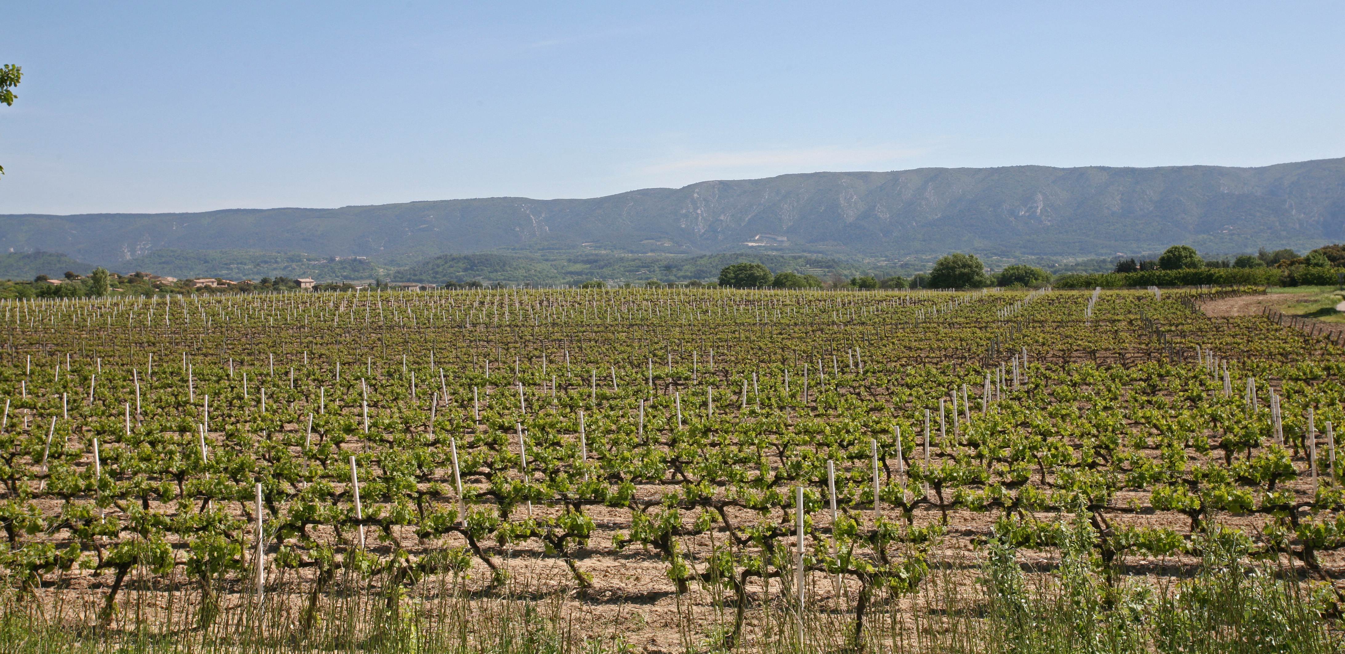 "AOC Ventoux" - Vignes sur la commune de Gordes - Vaucluse, France